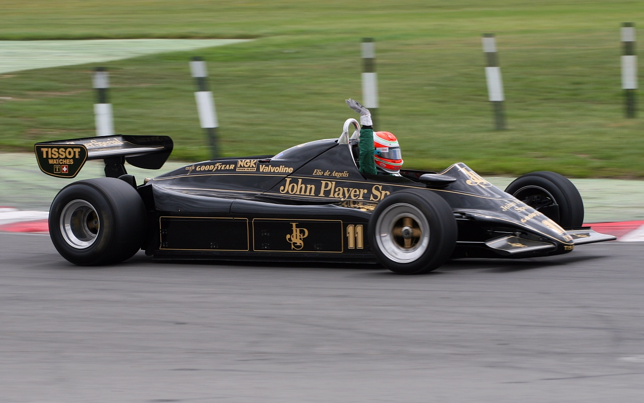 Fairuz Fauzy à bord de la Lotus 91 d'Elio de Angelis lors du Festival Lotus de Snetterton le 19 juin 2010.